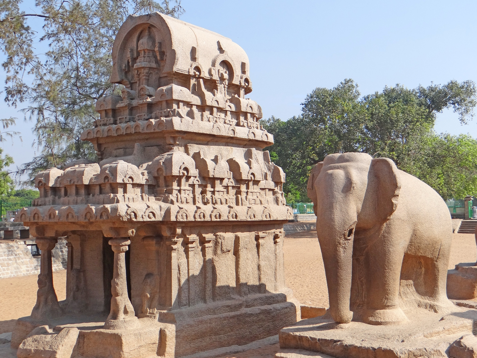 Vue du temple Sahadeva , un des cinq rathas (temples monolithes) de Mahabalipuram et d'un éléphant également monolithe La morphologie de ce temple est caractérisée par la fusion d'une pyramide à étages, d'une voute en berceau et d'une apside. Il est dédié à Indra. Ces cinq temples monolithes, appelés rathas (chariots), ont été sculptés sous le règne de Narasimhavarman (630-670), de la dynastie des Pallavas à Mahabalipuram en Inde du sud. Un ratha est un chariot en bois destiné à transporter le dieu lors d'une procession, il prend la forme d'un petit temple doté de roues, c'est par analogie que ces temples monolithes ont reçu ce nom bien qu'ils n'aient pas de roues. Ils reproduisent à l'identique dans le rocher les morphologies des temples construits à l'époque dans des matériaux non pérennes et qui ont tous disparu. Cette caractéristique en fait un site essentiel pour comprendre l'évolution de l'architecture dravidienne. Deux temples sont de forme pyramidale sur une base carrée (Arjuna et surtout le Dharmaraja), c'est cette morphologie qui a été retenue dans l'architecture dravidienne ultérieure car elle évoque le mont Meru, la demeure des dieux et répond à la cosmologie hindoue (la cella comme centre rituel rayonnant). Le site de Mahabalipuram est classé par l'UNESCO au patrimoine mondial. À l'époque des Pallavas, la ville était un port en relation avec le Champa (royaume vaincu situé au centre et au sud de l'actuel Vietnam), Bali en Indonésie, le pays khmer (Cambodge), autant de régions qui s'étaient indianisées par le biais des échanges commerciaux. Article de Wikipedia sur Mahabalipuram